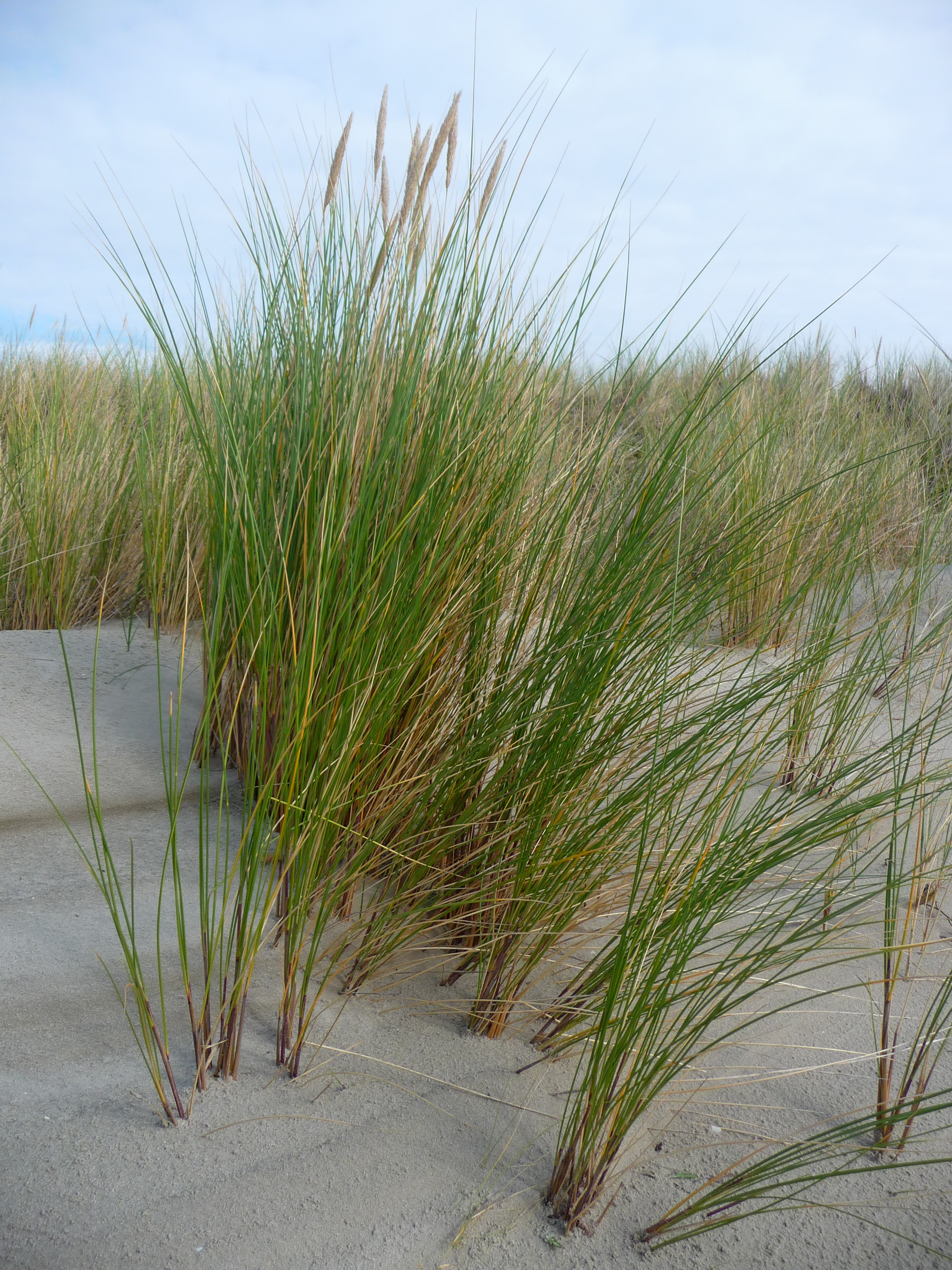 Strandhafer (Ammophila), fotografiert im Naturschutzgebiet am Kalfamer, der Ostspitze der ostfriesischen Nordseeinsel Juist (Niedersachsen, Deutschland)